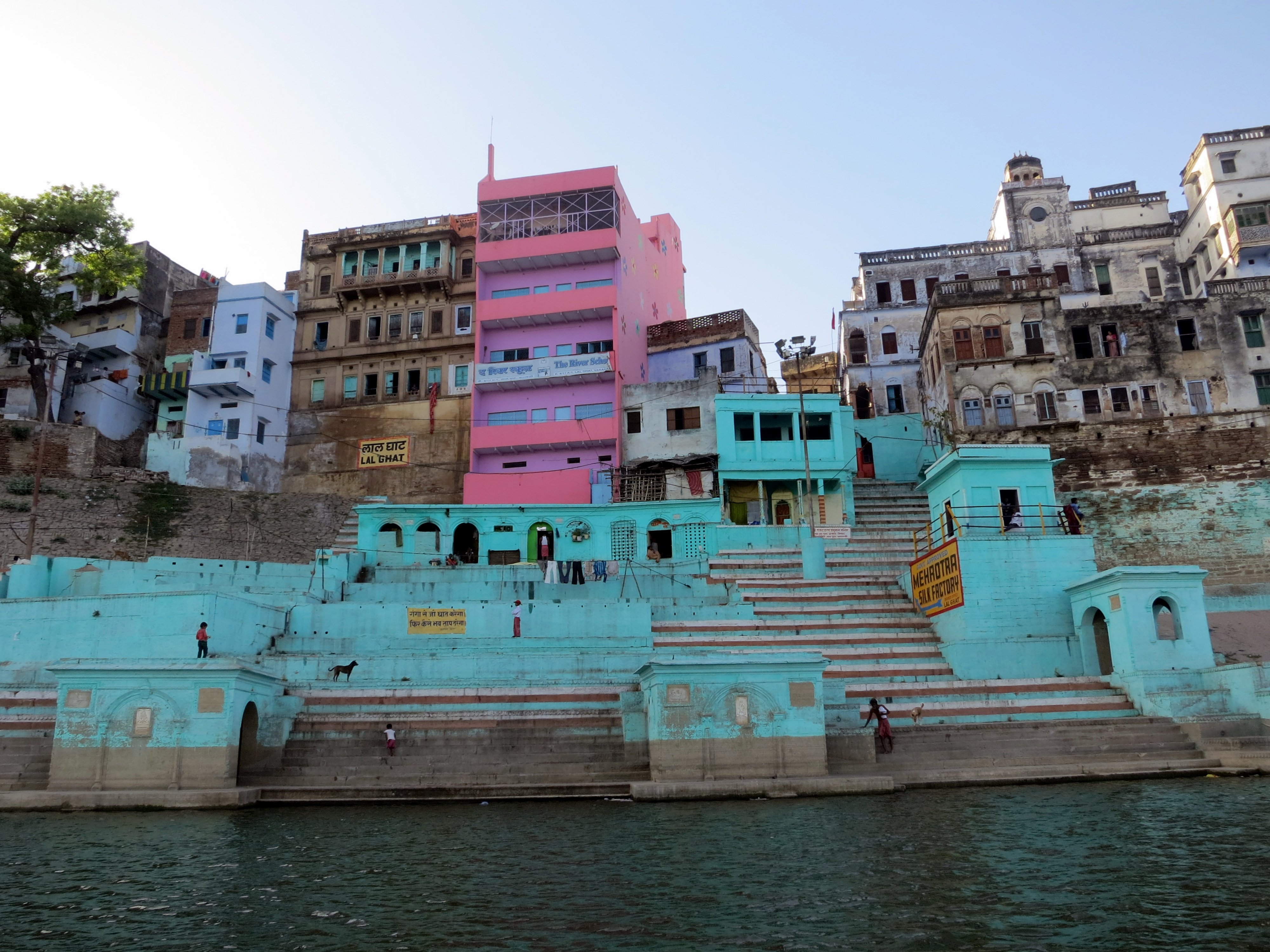 Lal Ghat in Varanasi.